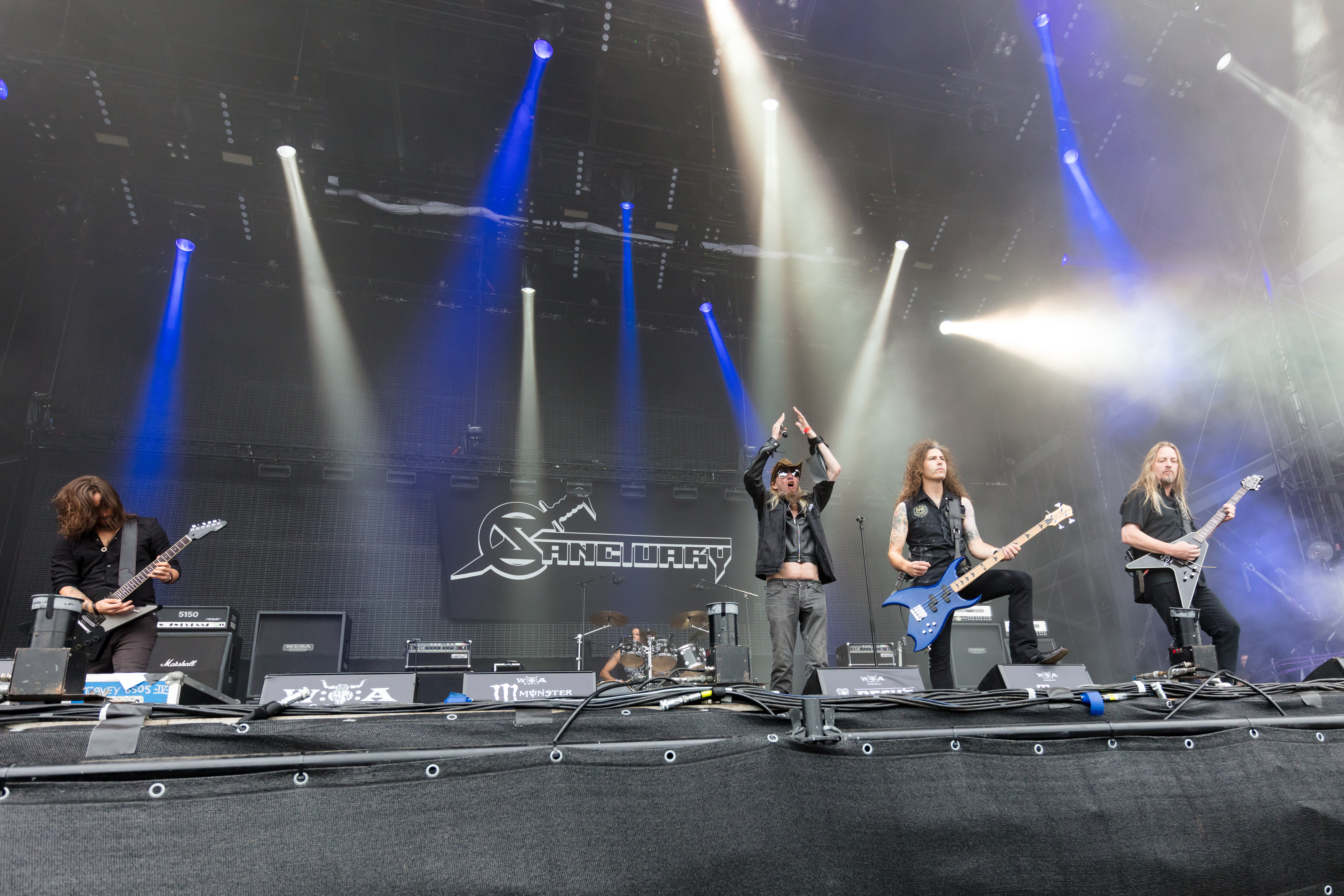 Sanctuary during Wacken Open Air at Schleswig-Holstein, Wacken, , Germany on 2017-08-04, Photo: Sven Mandel